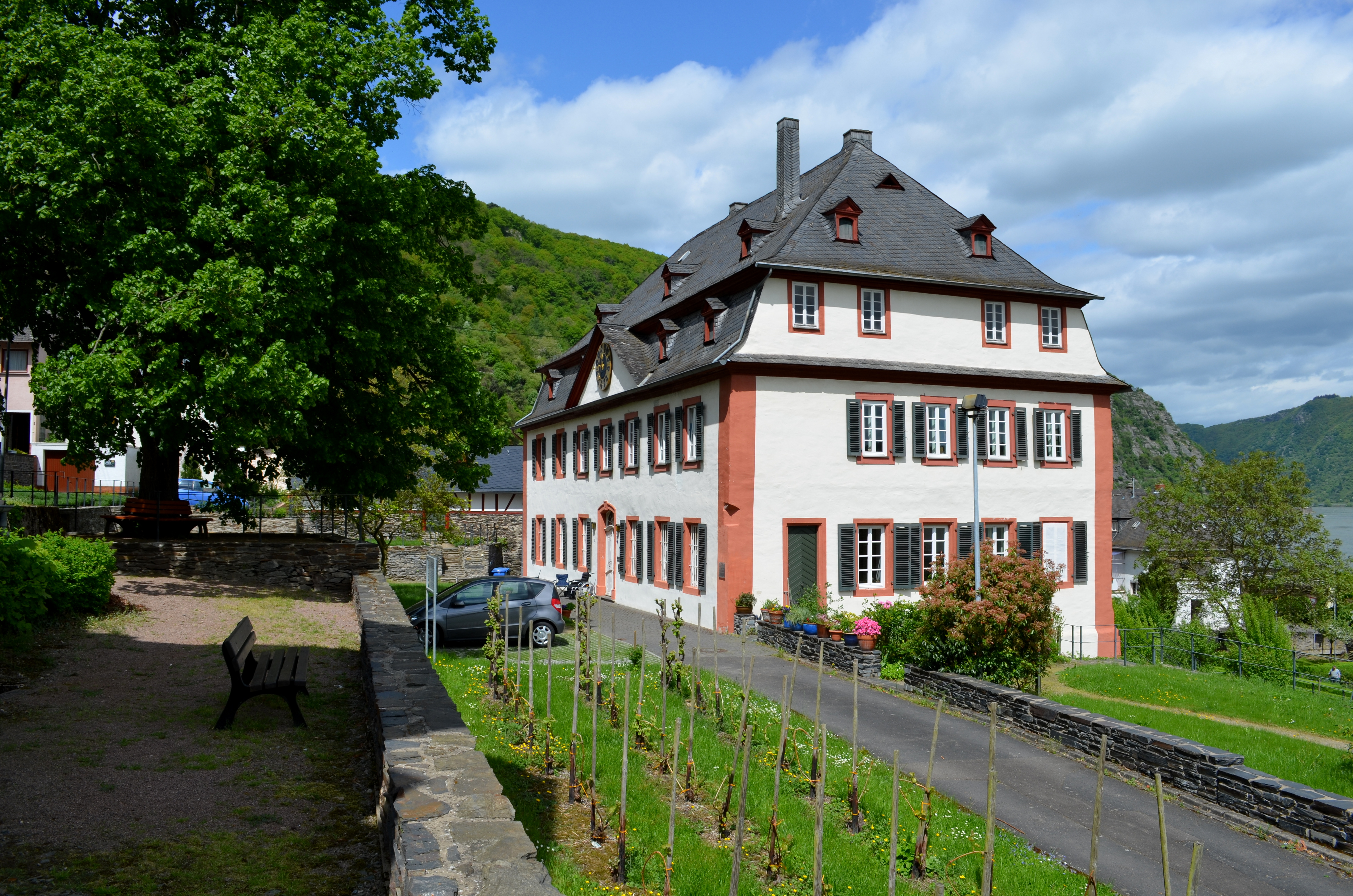 Propsteigarten in Hirzenach